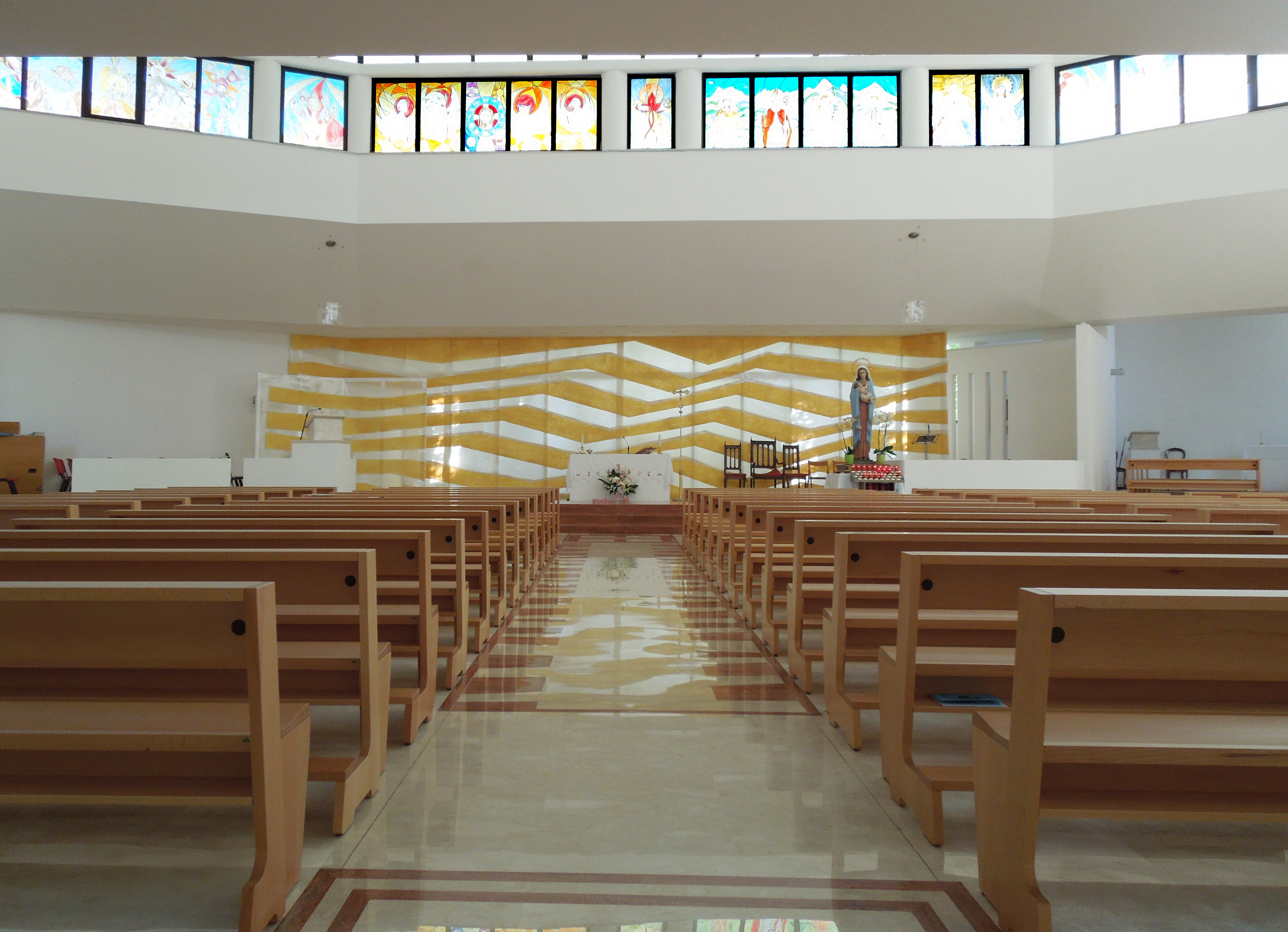 Interno della chiesa della Madonna della Salute di Teramo.